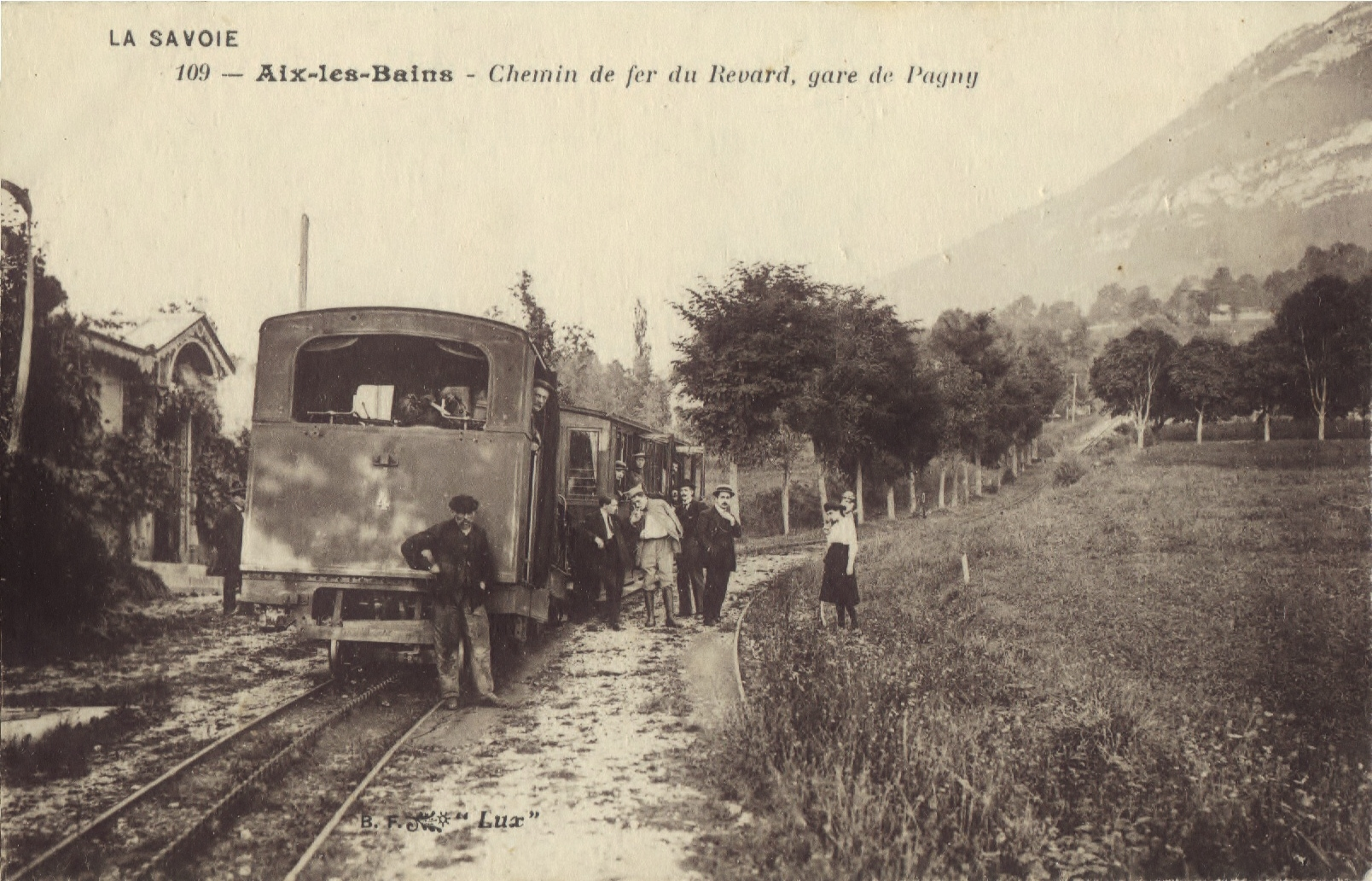 Aix Les Bains chemin de fer du Revard gare de Pagny